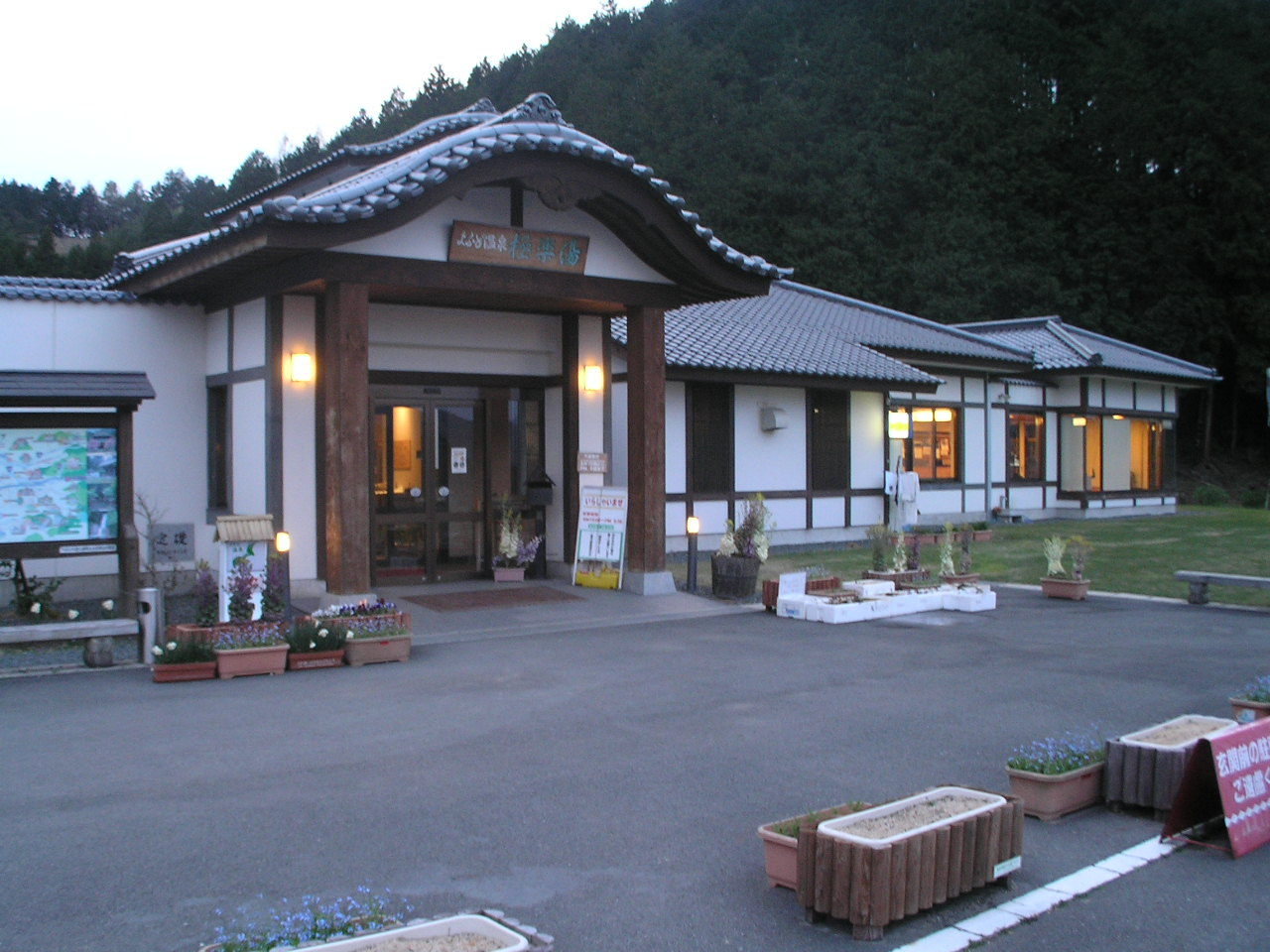 よふど温泉 ～photo by Autumn Snake【おぉたむ すねィく探検隊】